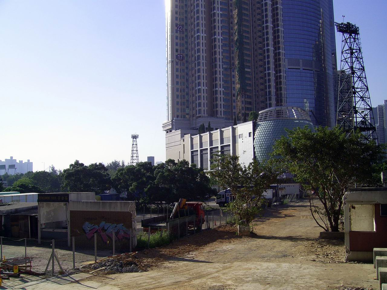 中文（香港）: 楊屋道球場舊址